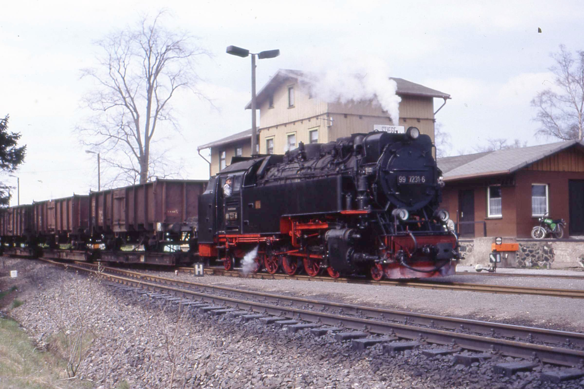 A Simson moped stands on the former goods shed as a train of empties bound for the Leipzig - Zwenkau region returns towards Nordhausen. The locomotive has just brought the wagons up from a power station at Silberhutte and has traversed the loop beyond the station here in Stiege to reverse its direction. Standard gauge wagons are still carried, I believe, on these rollbock converter bogies. The gauge of the Harz railway is 1000mm.